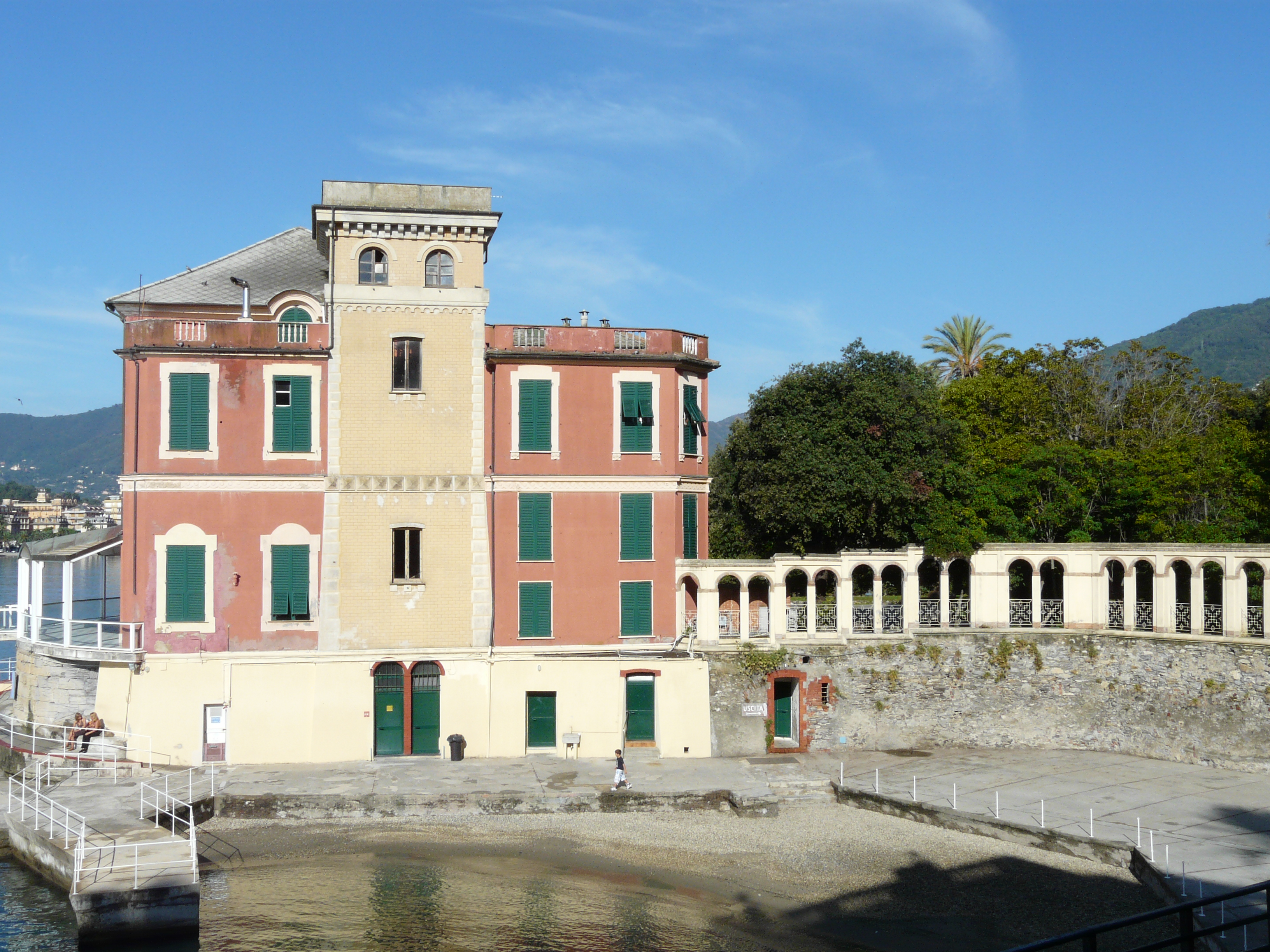 Villa Porticciolo, Rapallo, Liguria, Italia